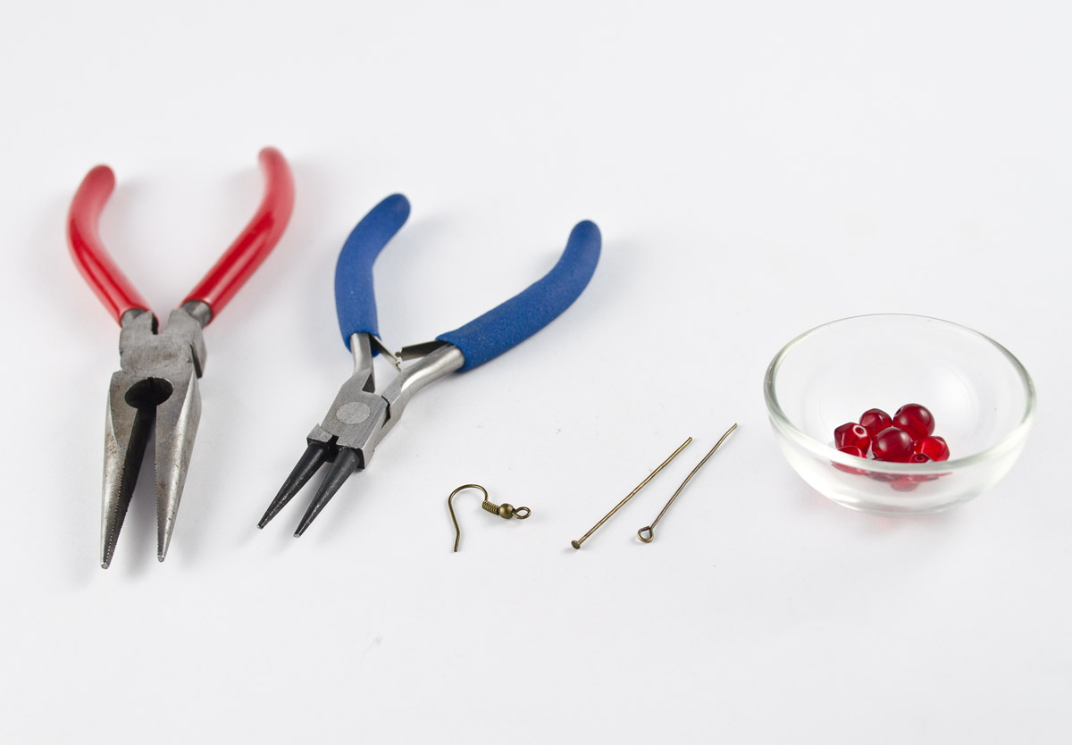 Potřeby pro výrobu šperků pomocí techniky "ketlování".